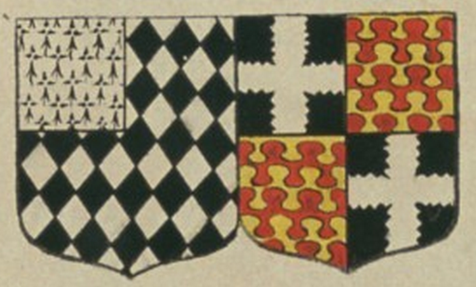 Blasons de Nicolas de Lamoignon et Anne Louise Bonnin de Chalucet sa femme apparaissant dans l'Armorial général de France d'Hozier